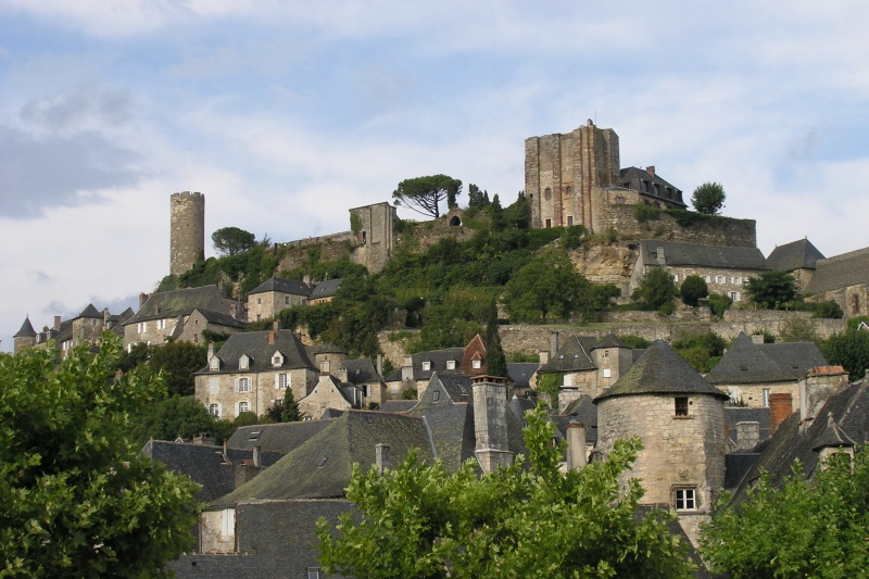 Vue de Turenne. Août 2005.